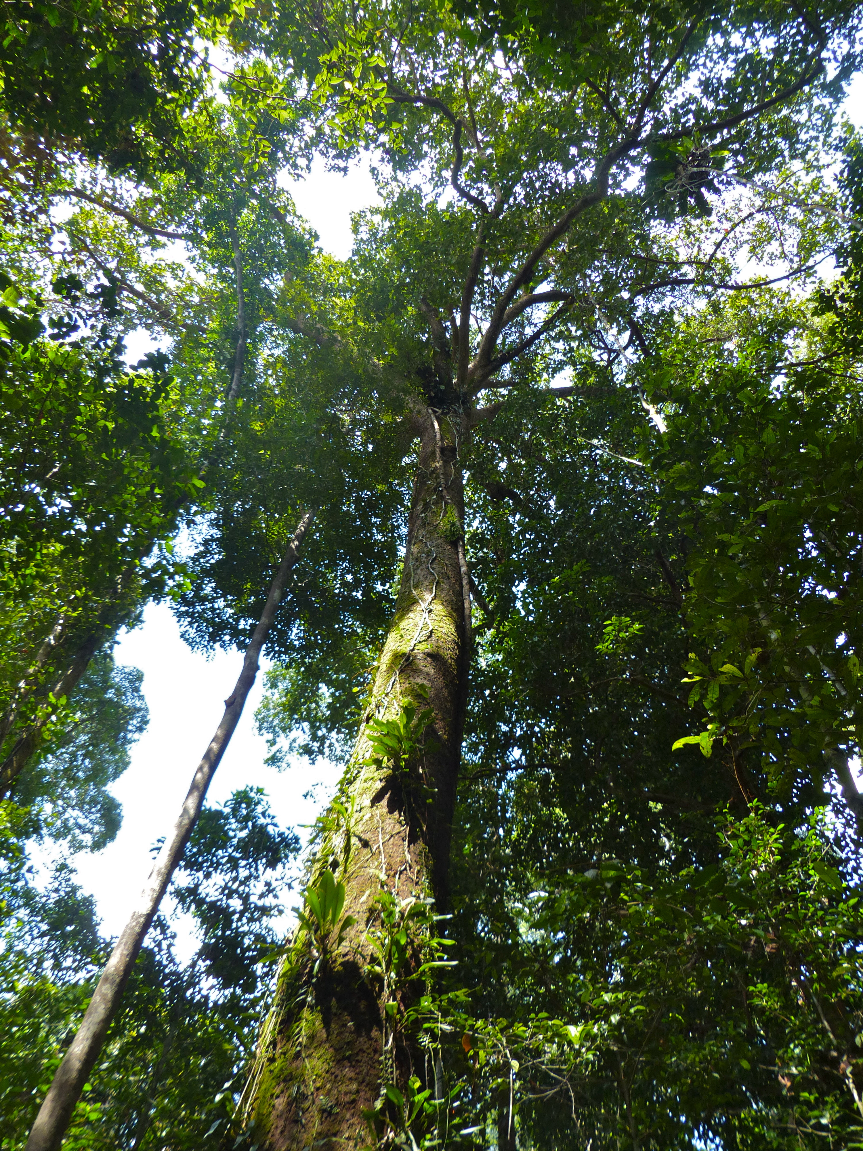 Niah NP, Sarawak, MALAYSIA